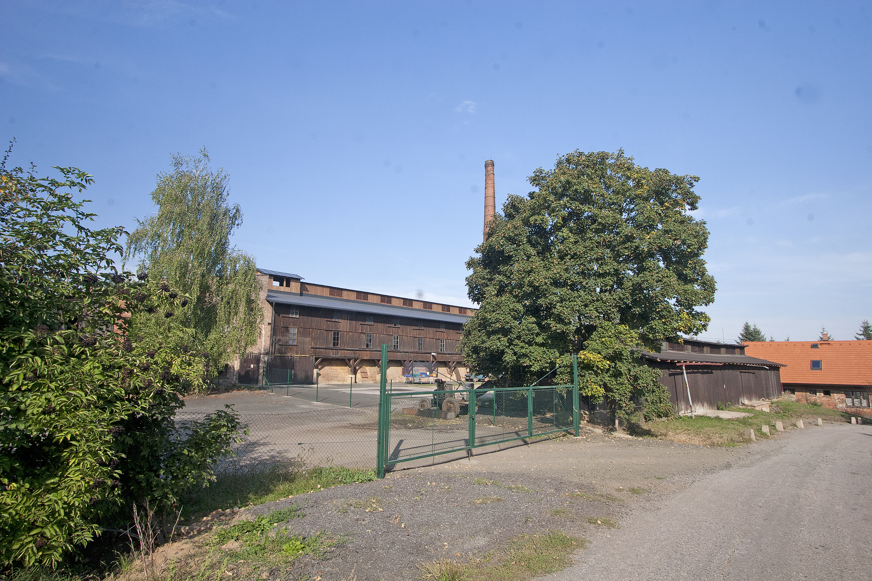 Šárovcova Lhota - bývalá cihelna